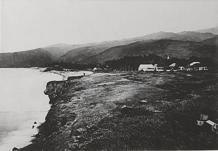 Panorama du quartier — La Possession, Réunion